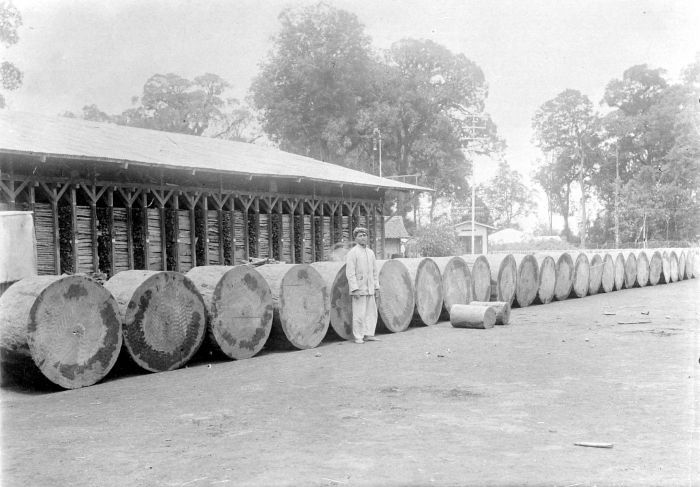 Repronegatif. Potongan kayu bulat rasamala, perusahaan kayu "Malabar" di Pangalengan